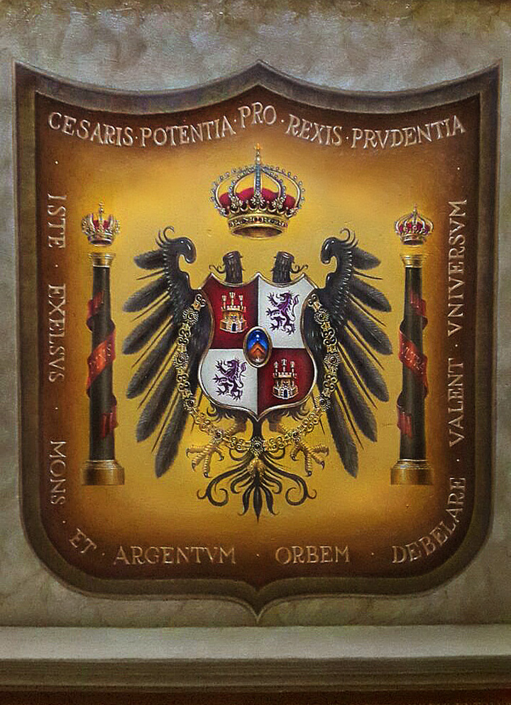 Tercer escudo de la Villa Imperial de Potosí, obra de Saulo Mariscal B.